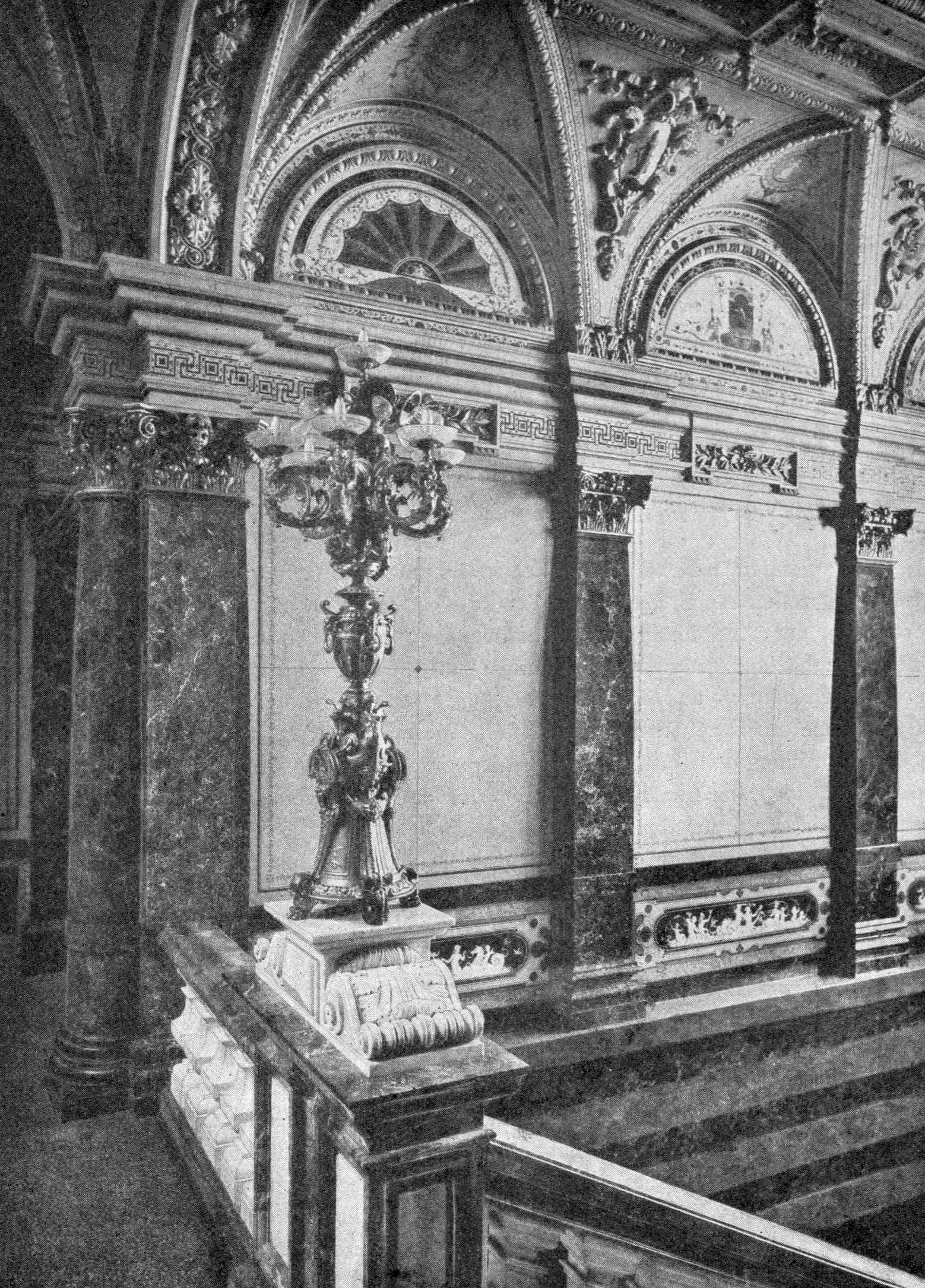 Der Treppenaufgang in der Villa Cassalette